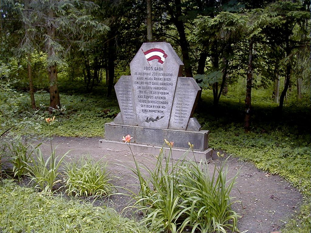 Rokasbirzs pie Aizputes, 1905. g. piemineklis 2000-07-08